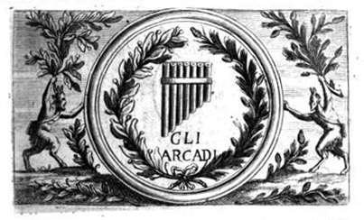 Arcadian Poets drom Accademia dell' Arcadia (Rome) Seal